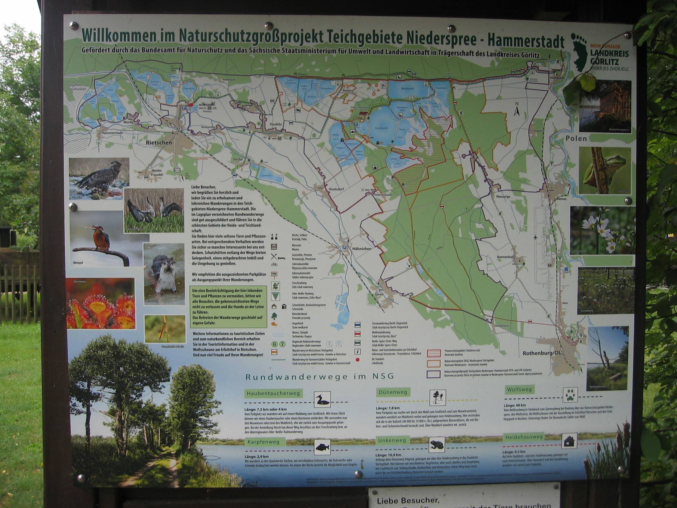 Rietschen, Turnerweg, Info-Tafel Naturschutz am Erlichthof; Aufsteller mit Karte und Legende zum Naturschutzgroßprojekt "Teichgebiete Niederspree-Hammerstadt" (Europäisches Vogelschutzgebiet)